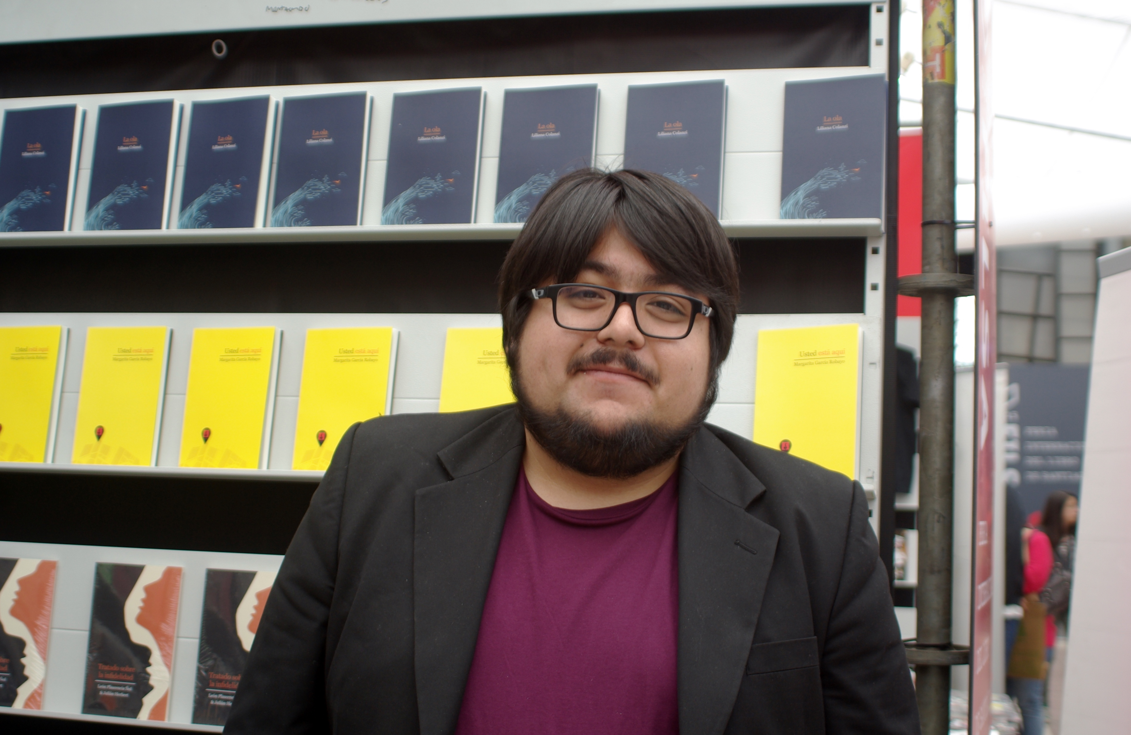 El escritor chileno Diego Zúñiga en el stand de la editorial Montacerdos durante la Feria Internacional del Libro de Santiago 2015